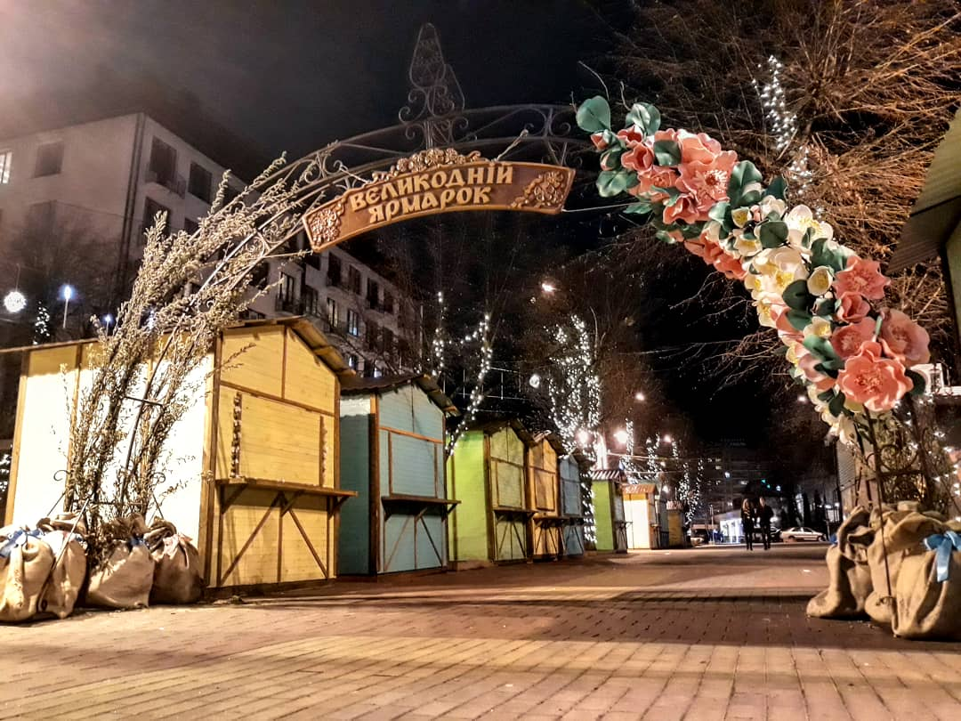 Арка на вході до Хмельницького Великоднього Ярмарку на площі перед кінотеатром ім.Шевченка. Вечір 12 квітня. Автор - Василь Камінський.